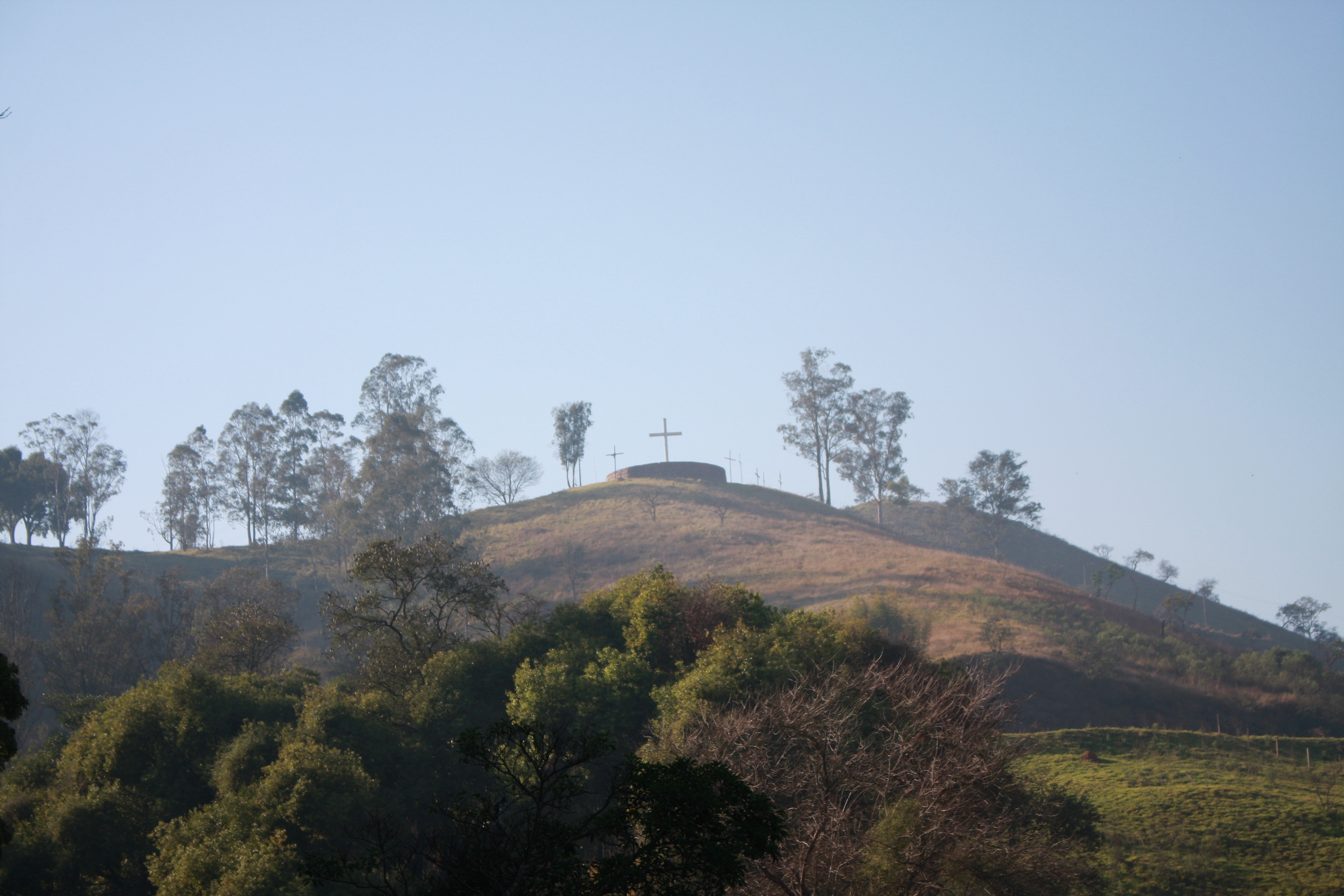 Morro da Cruz em Pirapora do Bom Jesus, estado de São Paulo.